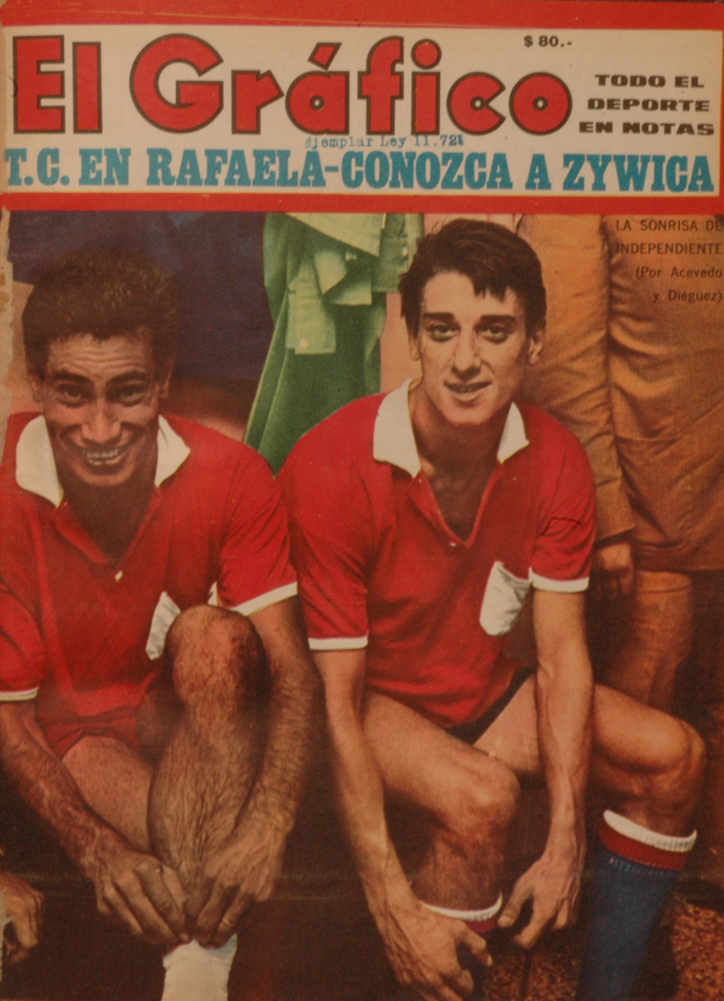 El Grafico del 09 de Mayo de 1967. Edicion 2483